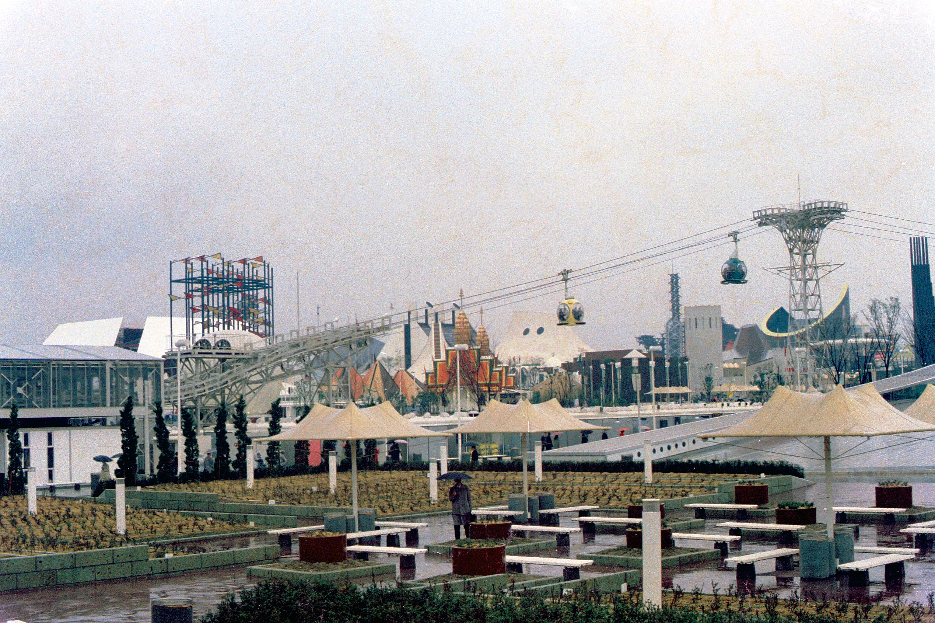 Thailand Pavilion, Osaka Expo'70. April 1970.